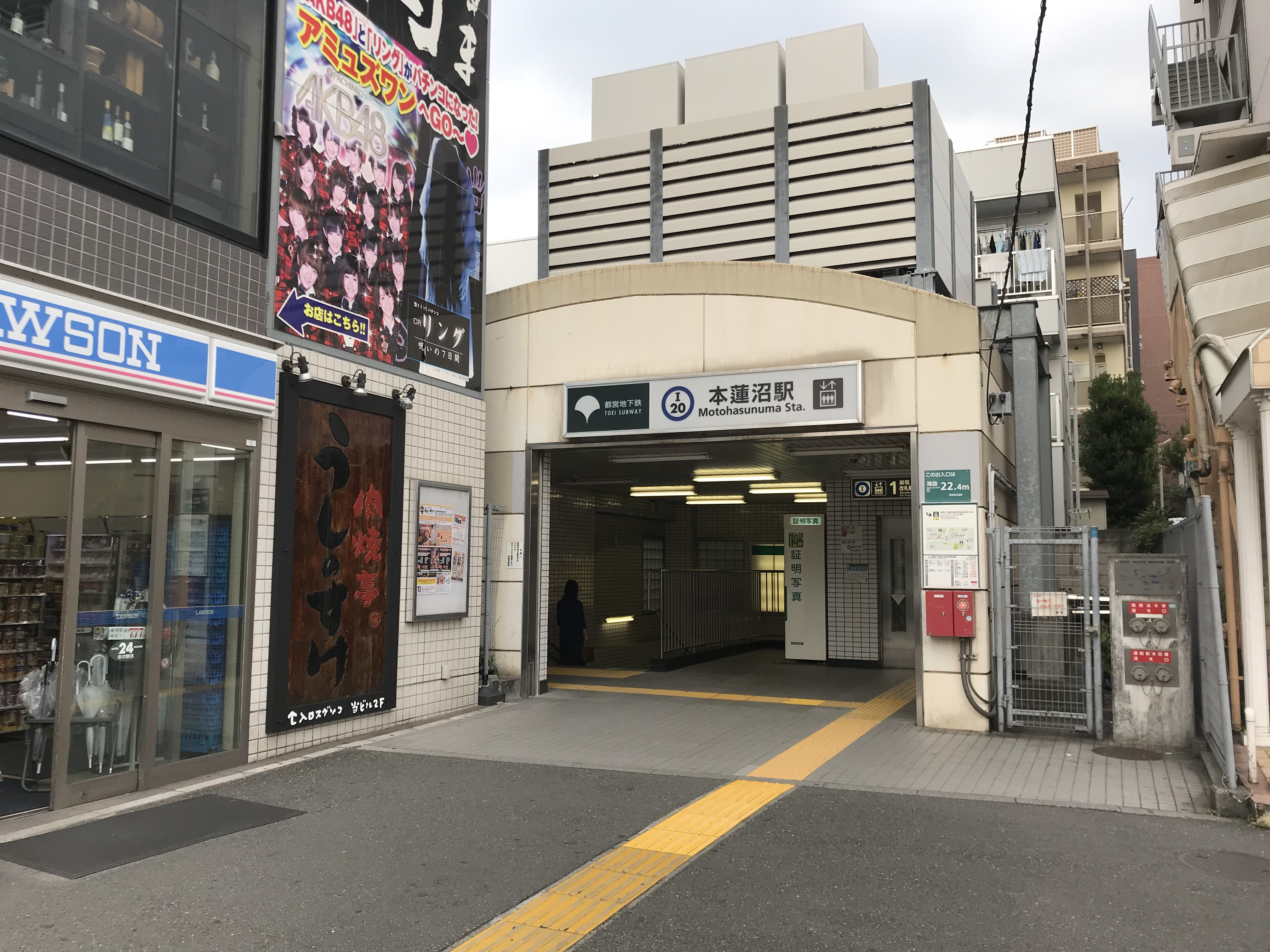 都営地下鉄三田線本蓮沼駅A2番出入口